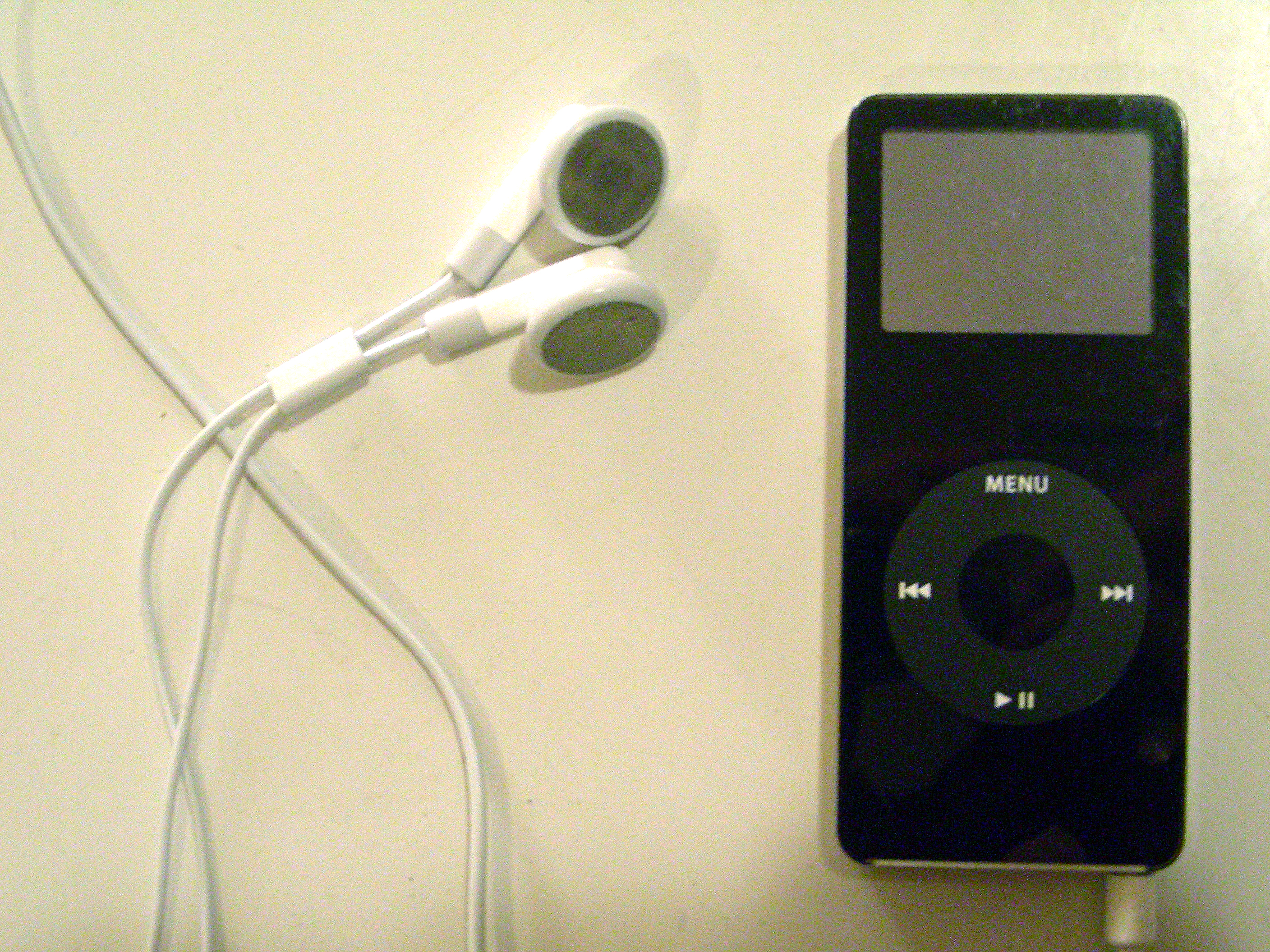 gemaakt door BranMoviC, bewerkt door mij. met instemming geüpload.